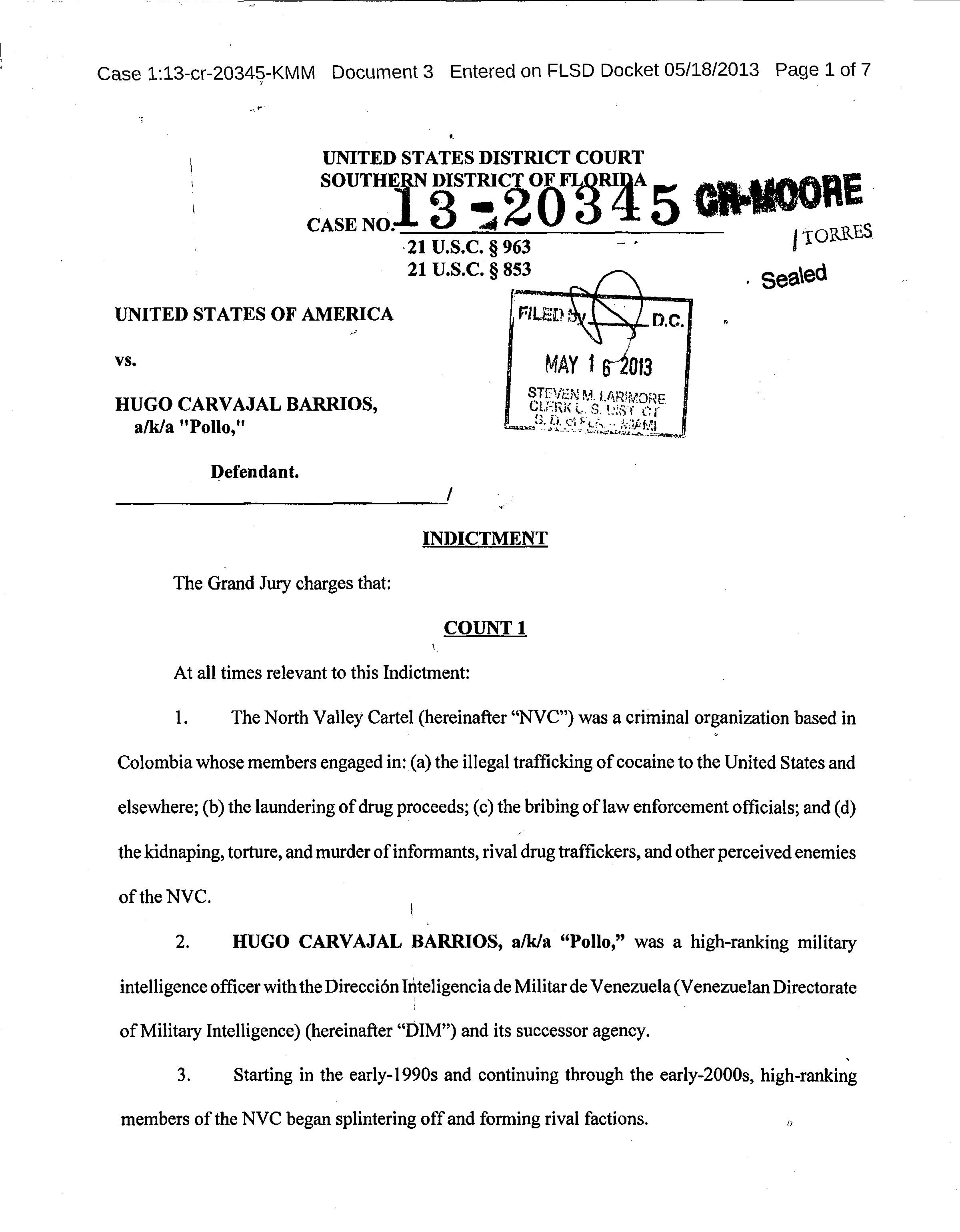 Facsímil del 'Indicment' contra el general y narcotraficante (según el Departamento de Estado EEUU) Hugo Carvajal.